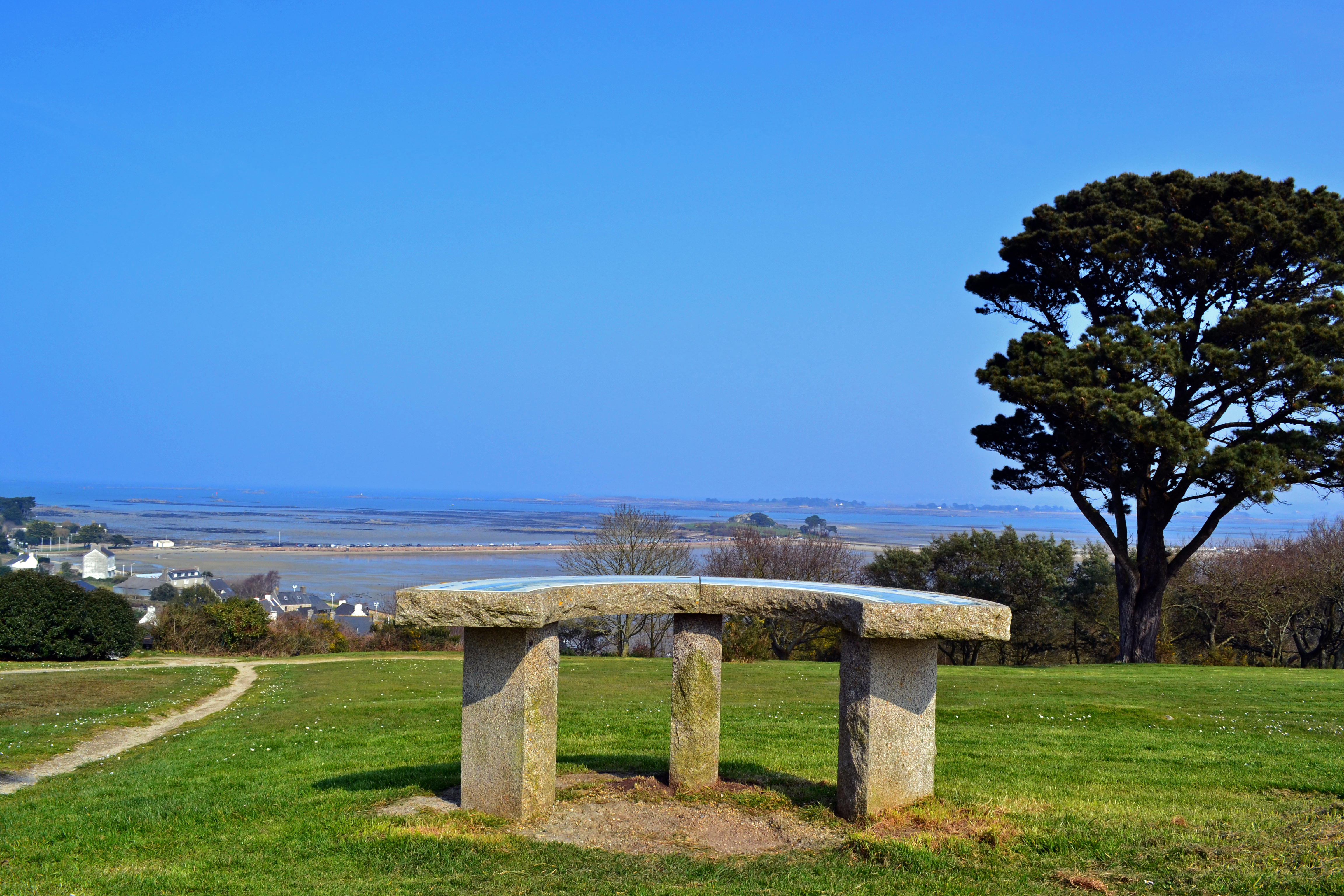 Vue panoramique sur la Baie de Morlaix depuis le parc du Champ de la Rive à Saint-Pol-de-Léon.